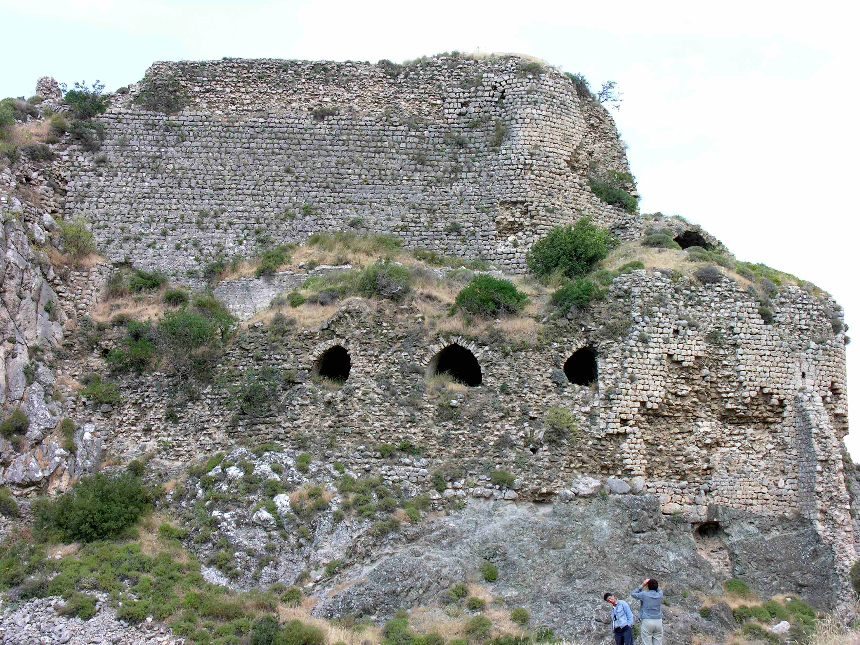 Baghras - burcht in Amanosgebergte bij Antakya, Turkije. Foto genomen door Godfried Warreyn in mei 2006